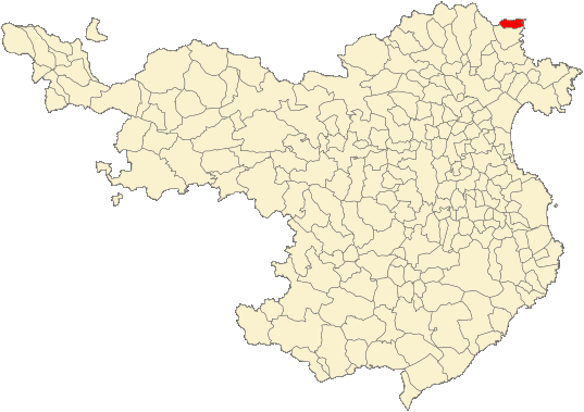 Municipio de Portbou respecto a la provincia de Gerona (España)